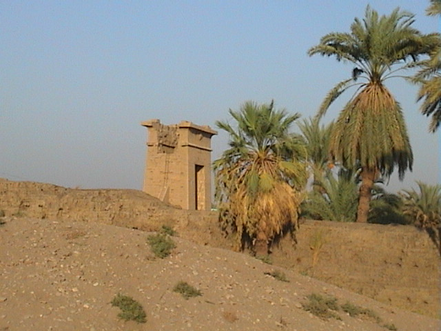 Vue de la grande porte du temple de Montou à Karnak - août 2004